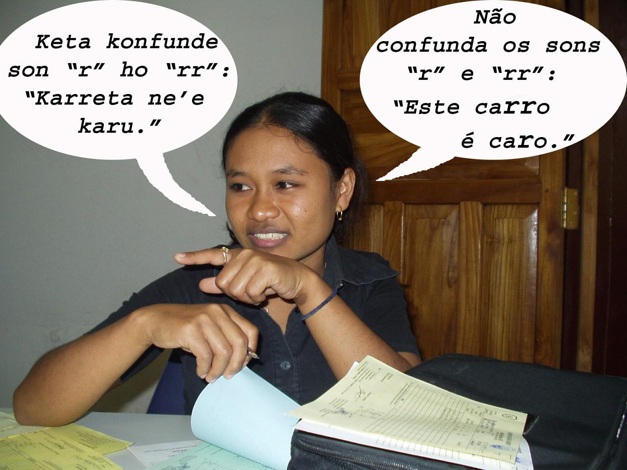 Photo & editing both by João Paulo T. Esperança. This photo was used as ilustration in a Portuguese language course in Tetum, whose lessons used to be published weekly in the East Timorese newspaper Lia Foun. Fotografia e composição da autoria de João Paulo T. Esperança. Esta fotografia foi usada como ilustração num curso de língua portuguesa em tétum cujas lições eram publicadas no jornal timorense Lia Foun. Person portraited / Pessoa retratada: Icha Meiliana Bossa, an East Timorese girl (uma moça timorense), speaking Tetum and Portuguese